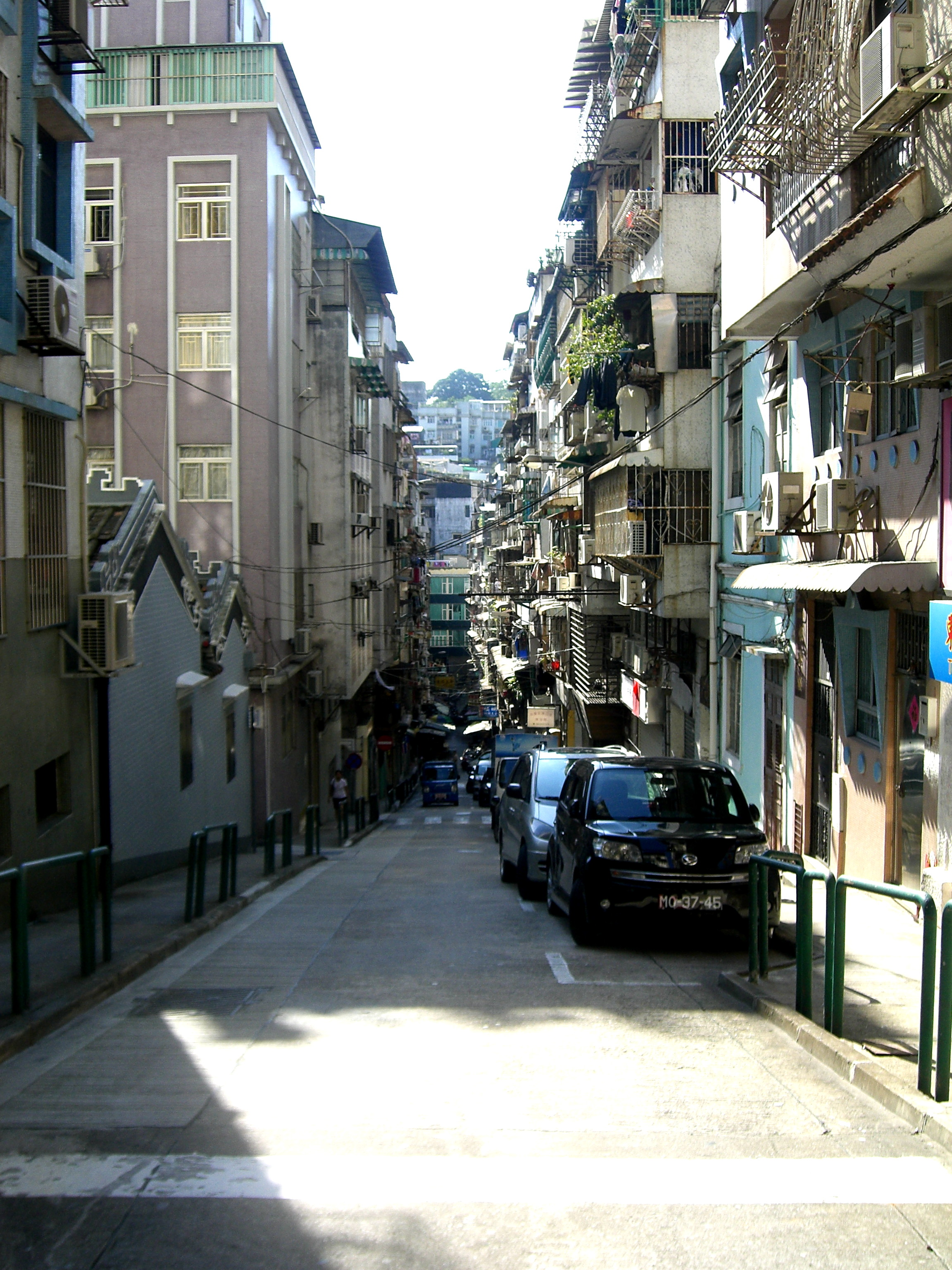 Rua da Colina